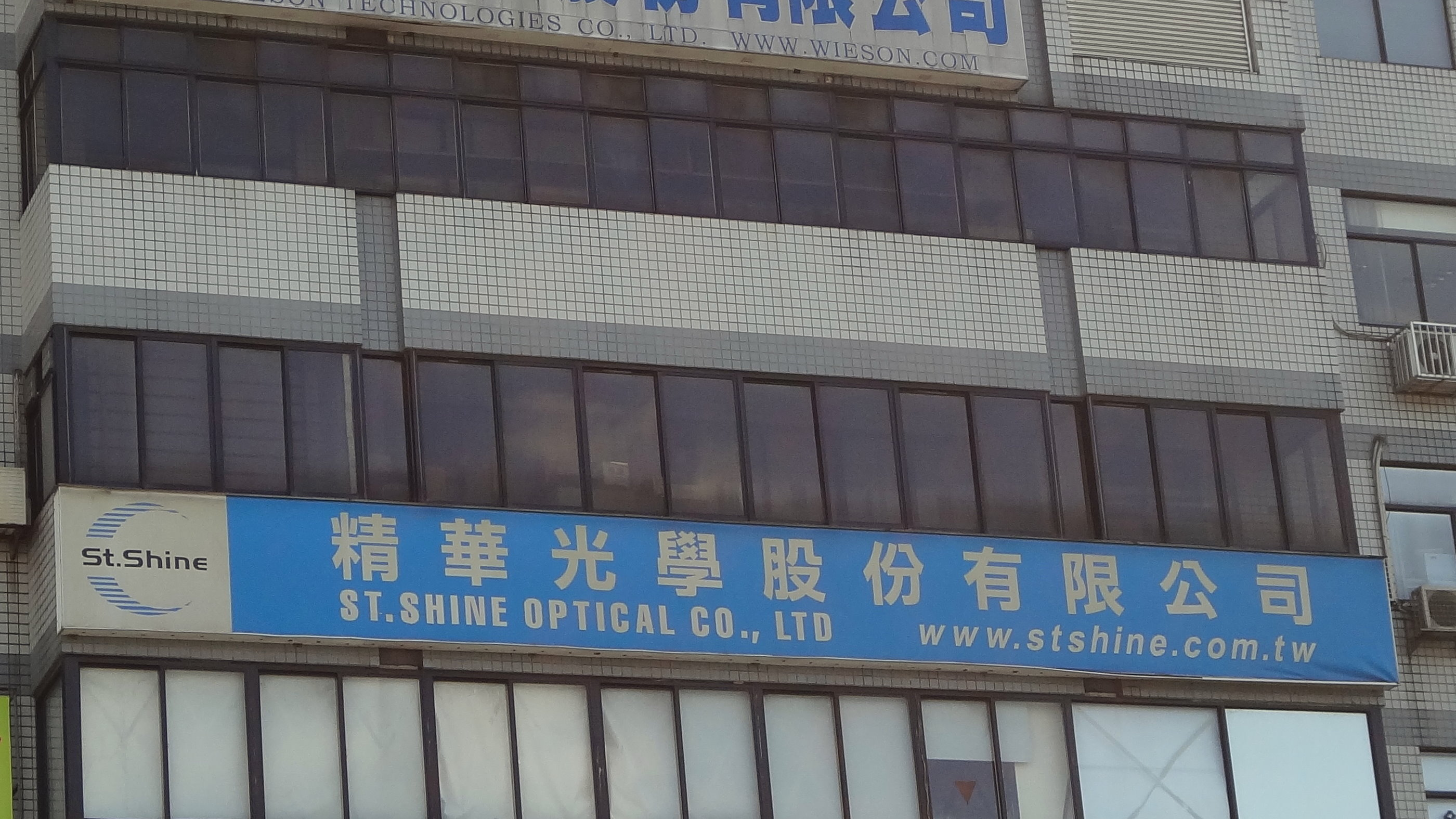 精華光學總部，位於新北市汐止區大同路一段276號5樓（世紀經貿大樓）。